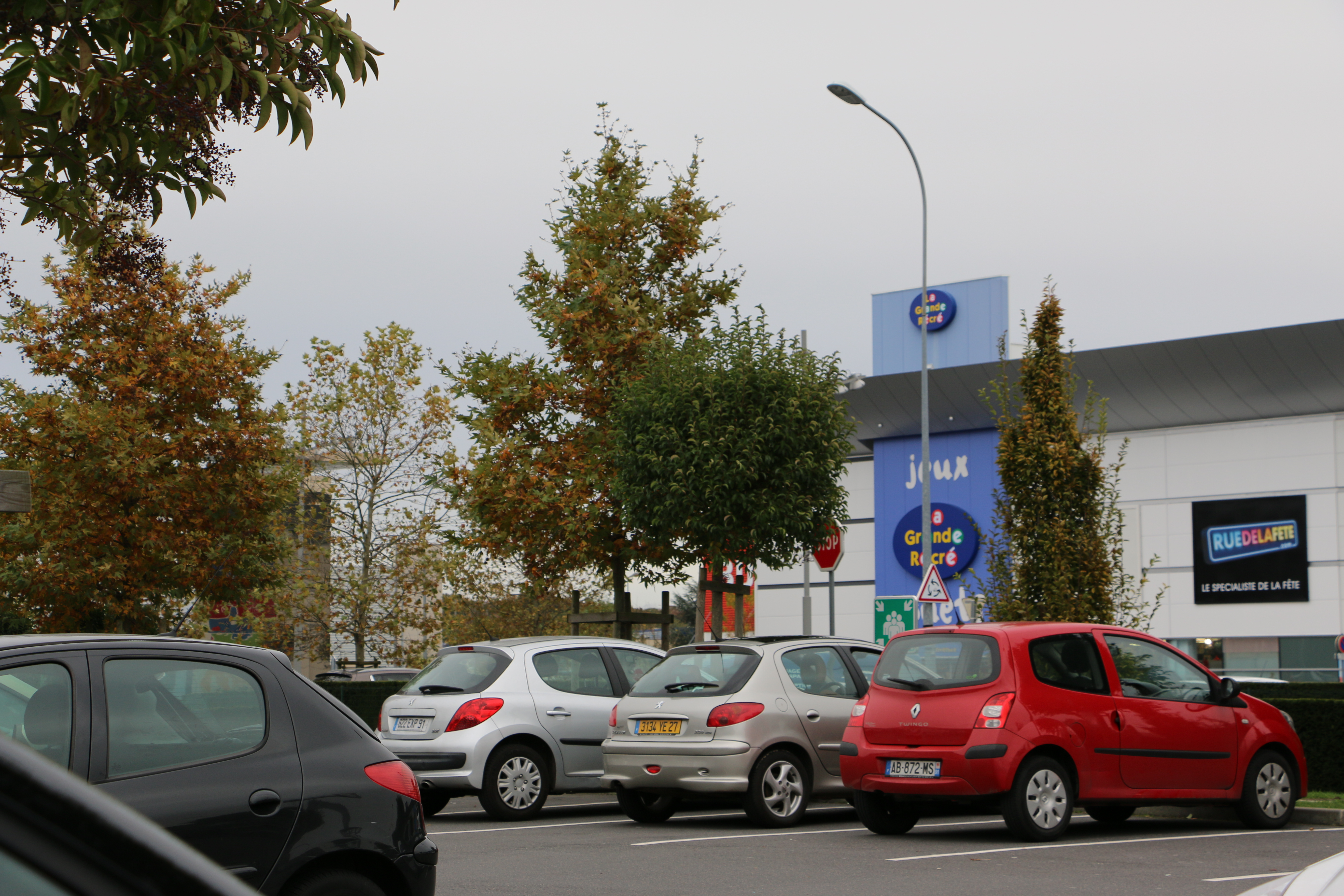 Croix Blanche - la grande récré